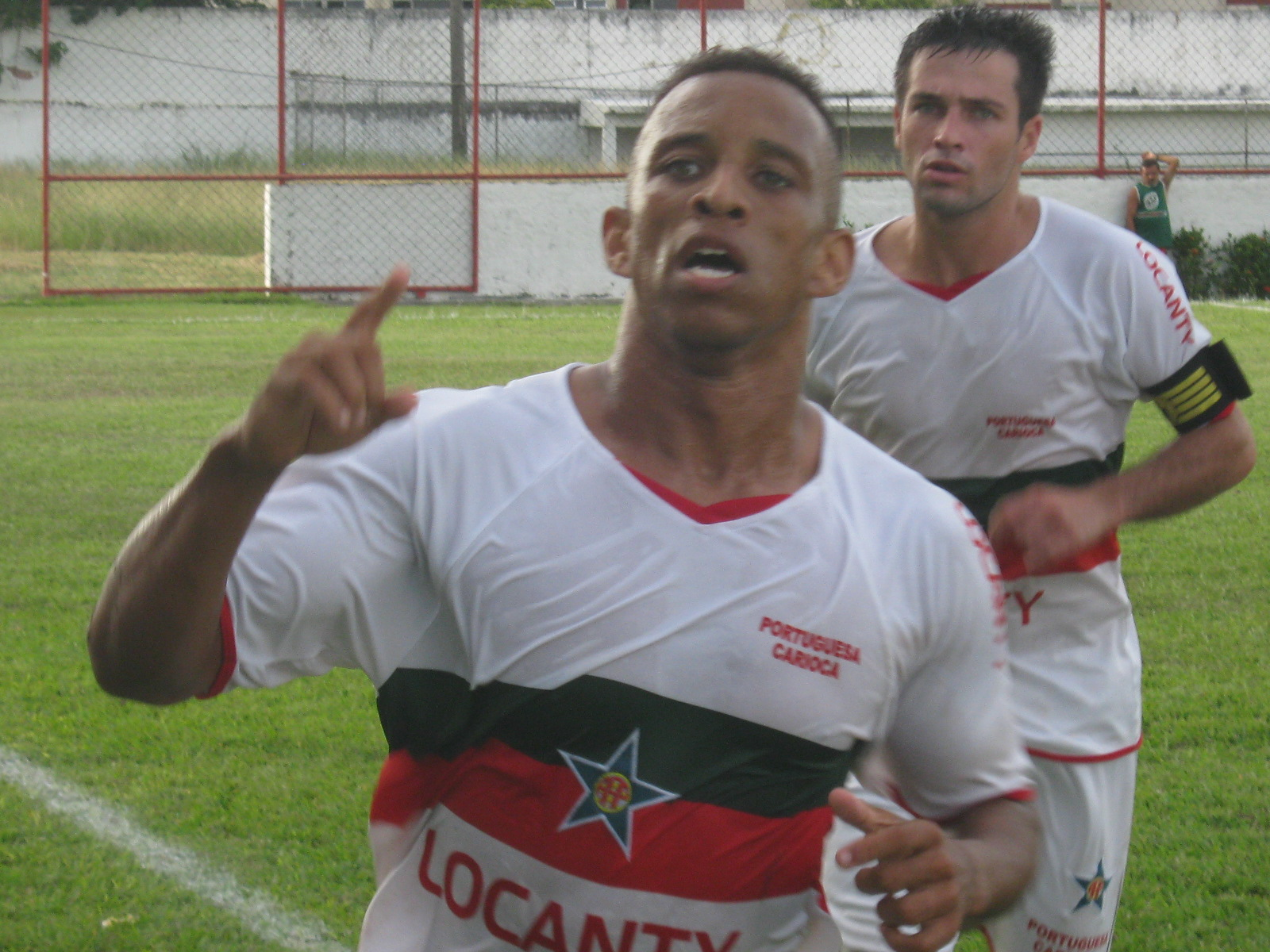 Comemoração dos atletas da Portuguesa Mineiro e Digão após o gol de Mineiro contra o Quissamã na vitória da Lusa por 2 a 1.